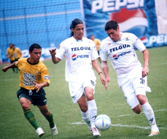 Paulo Centurión disputando un balón con Raúl González de Petapa, el la foto Gustavo Cabrera Marroquín de Comunicaciones también.